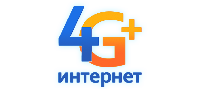 Интернет компания SkyLine-WiMAX